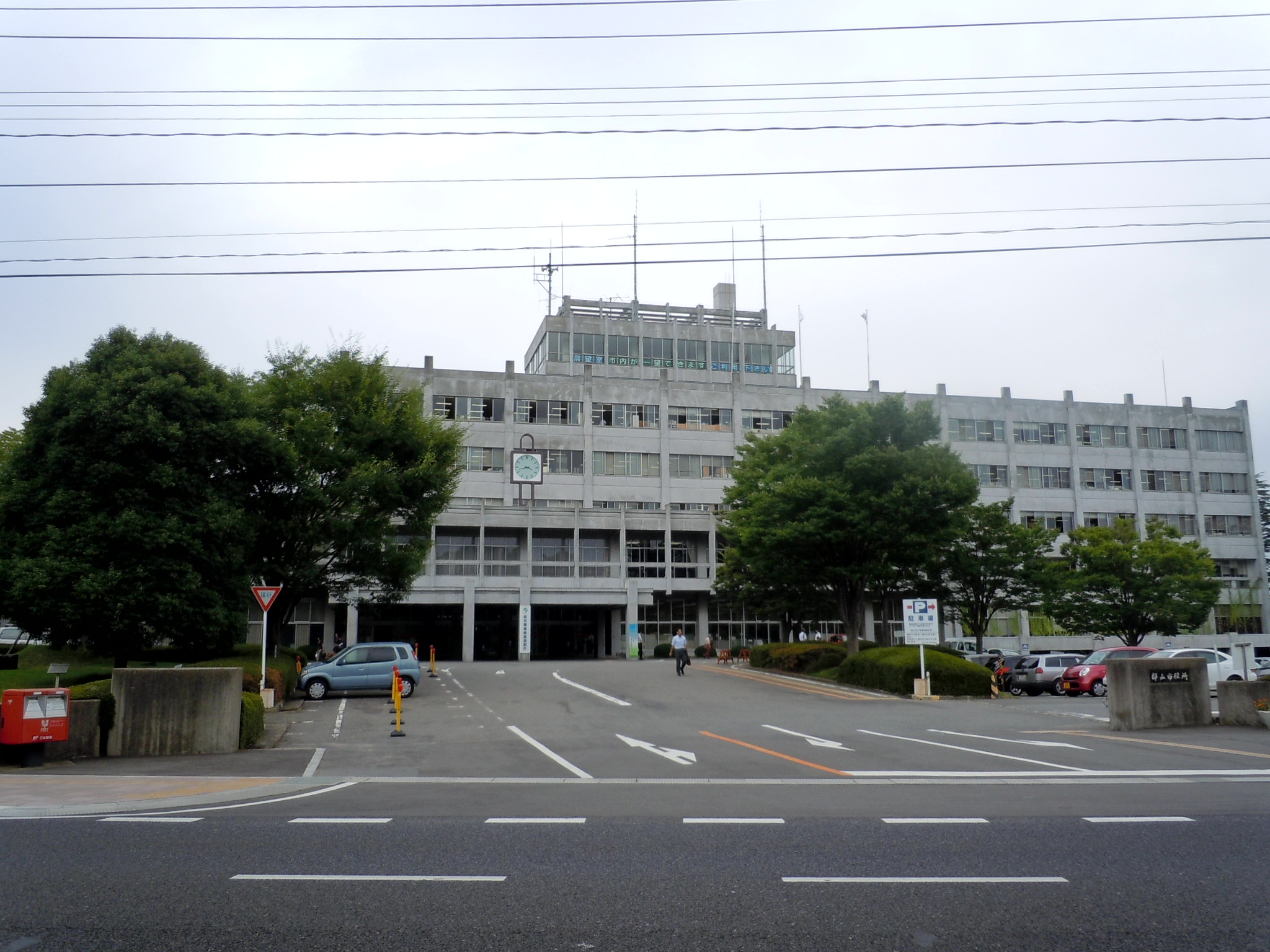 郡山市役所